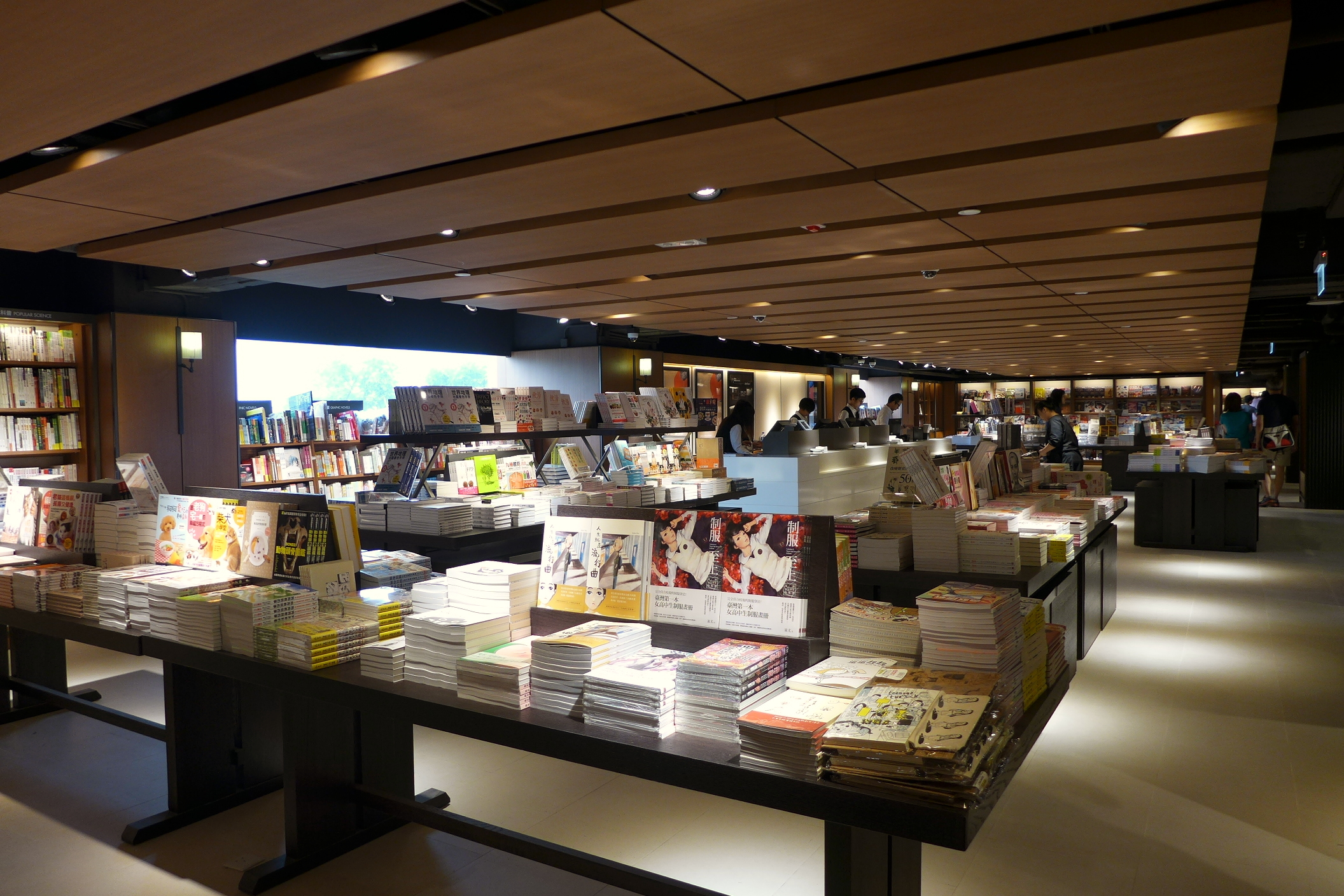 Eslite Tsim Sha Tsui Store